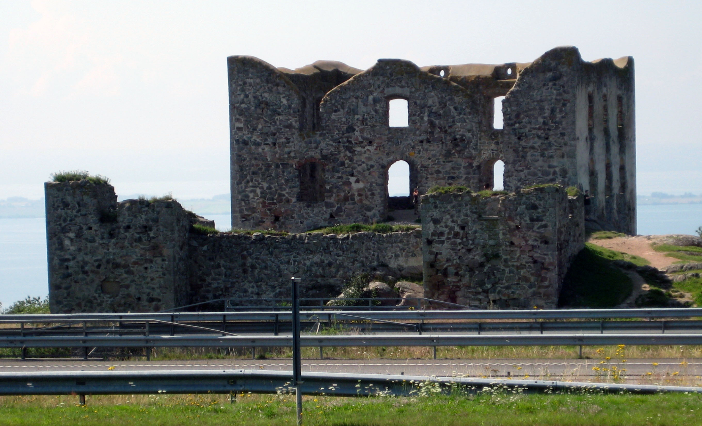 Brahehus ruin med E4:an framför.